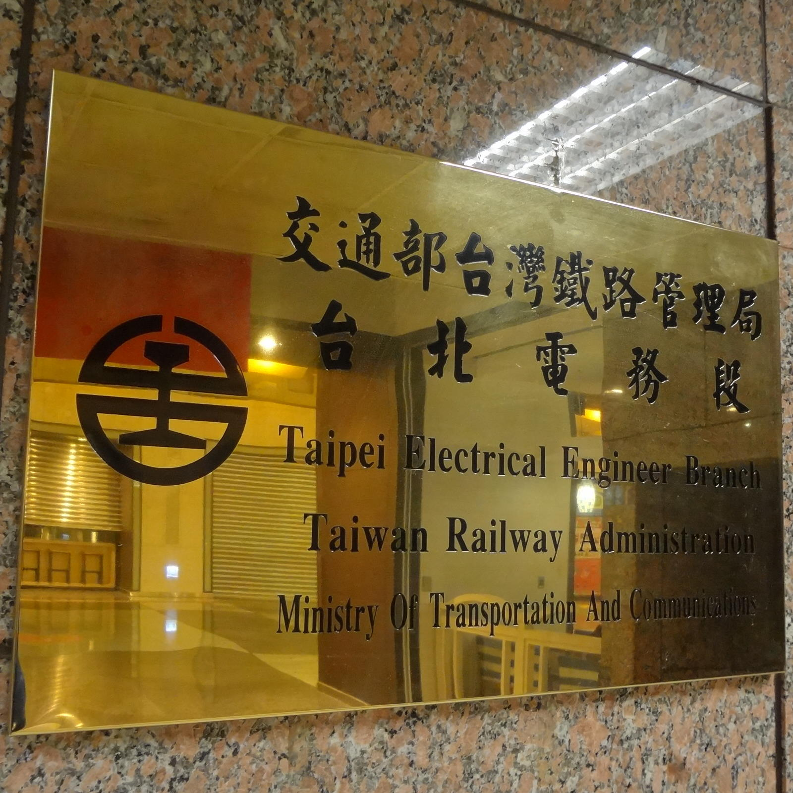 臺灣鐵路管理局臺北電務段銘板，位於板橋車站1樓。